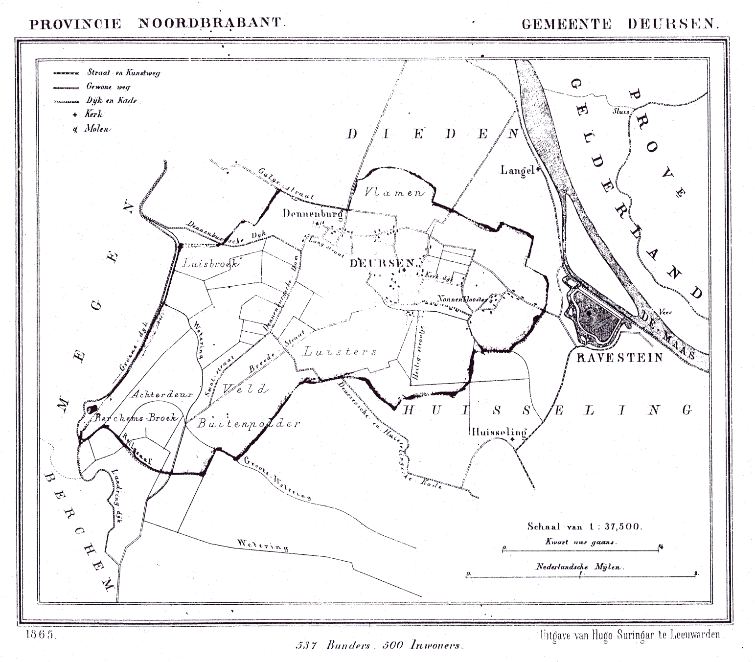 Nederland, Noord-Brabant, Gemeente Deursen